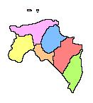 Grenzen van de Ommelanden; historische Gebietseinteilung der Stadt und Ommelande in der heutigen Provinz Groningen.